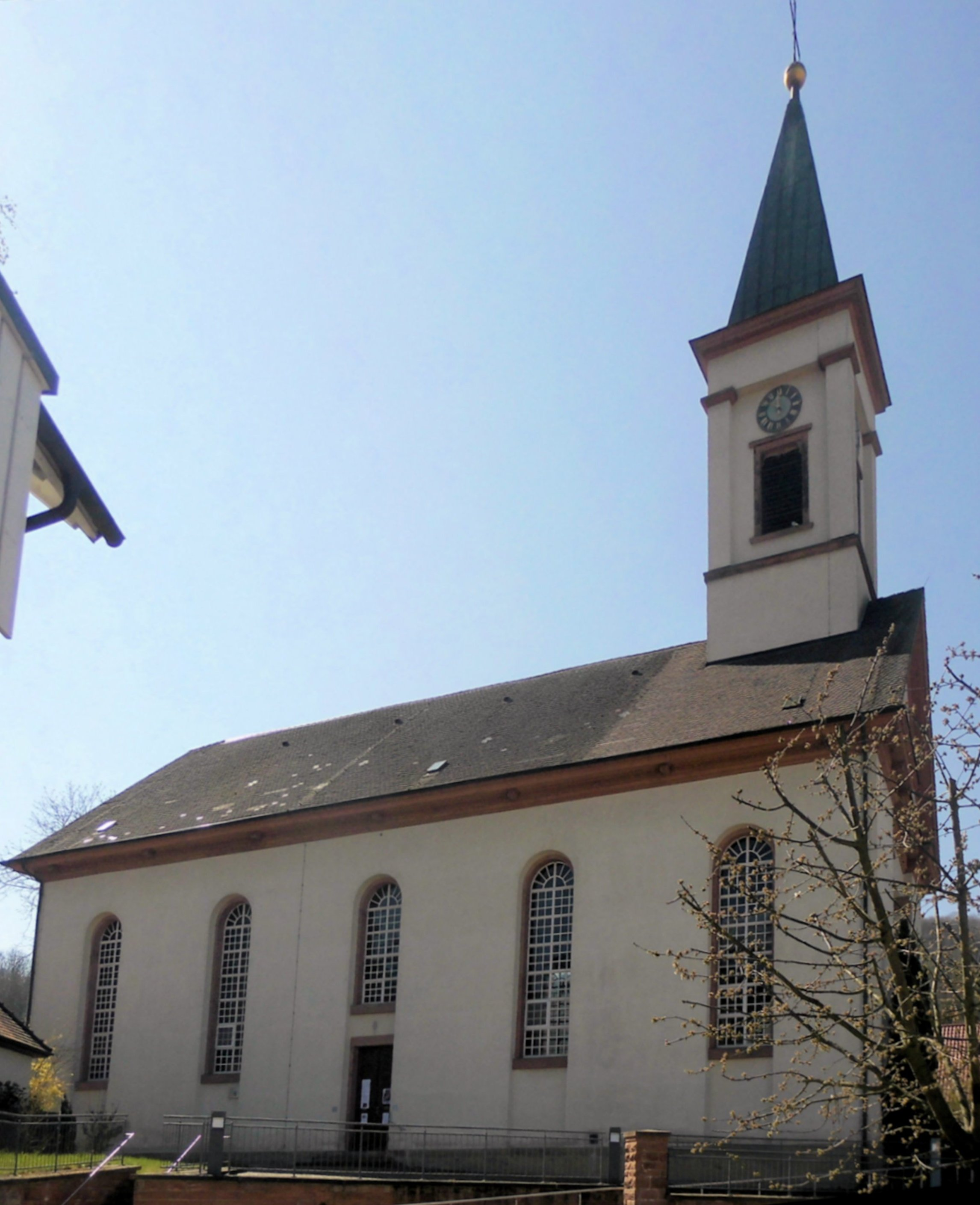 Kirche St. Vitus in Amolzern, Stadt Endingen am Kaiserstuhl, Deutschland